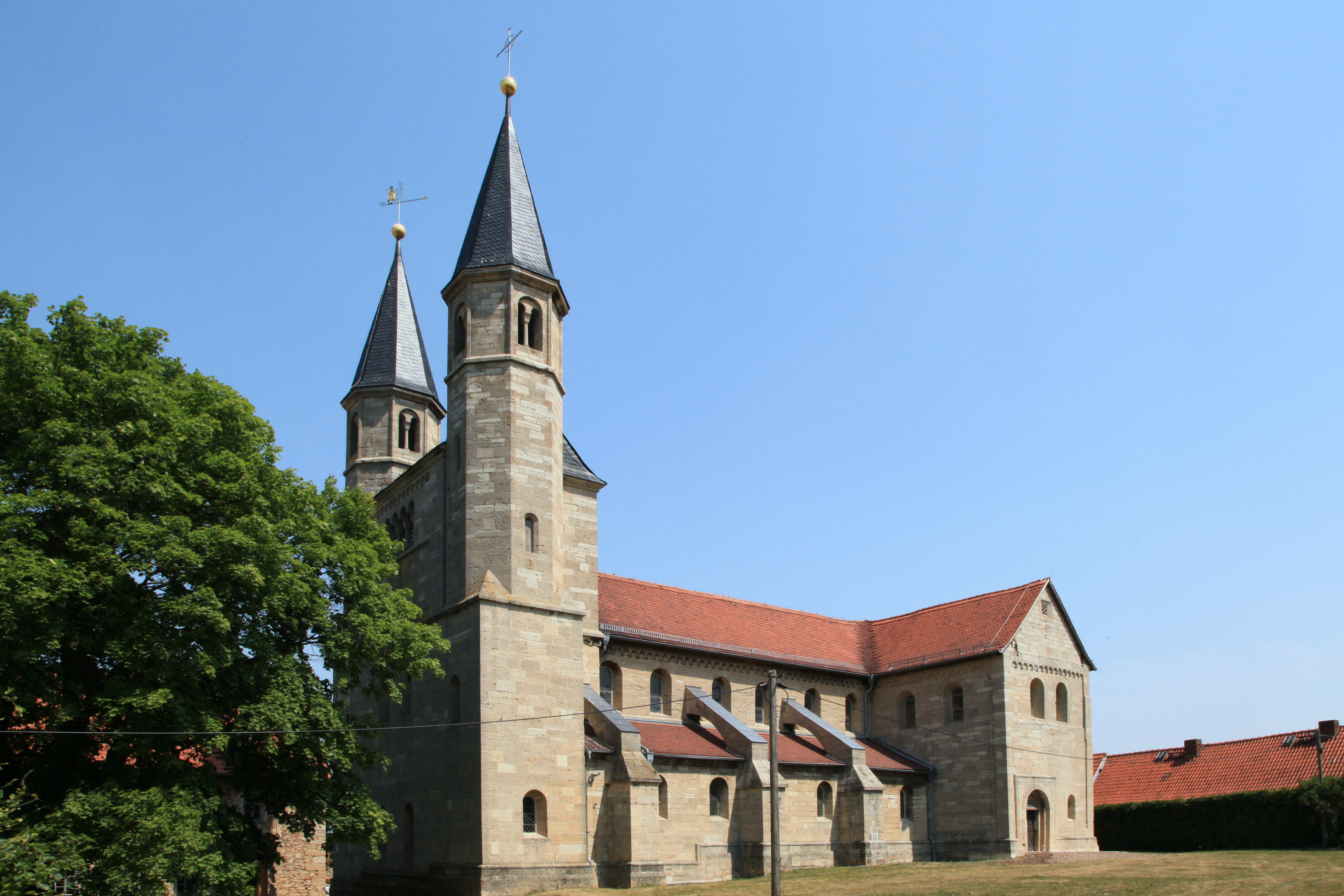 Klosterkirche St. Gangolf, Klosterstraße in Münchenlohra, Großlohra